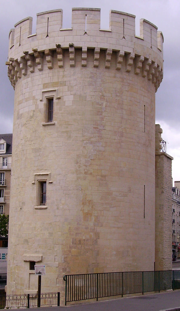 Tour Leroy à Caen (Calvados).